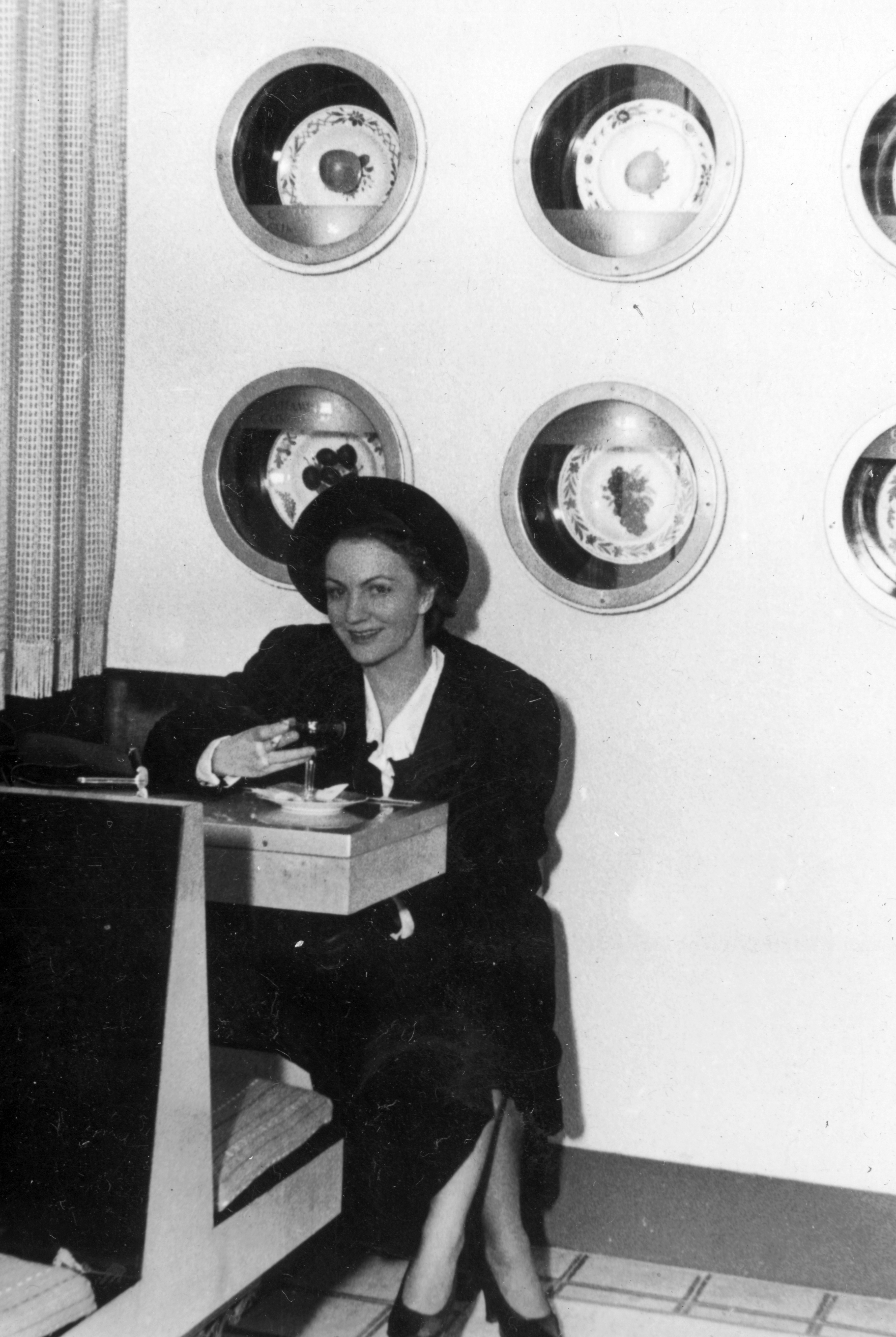 Bulla Elma színművésznő. Location: Hungary Title: Bulla Elma színművésznő.